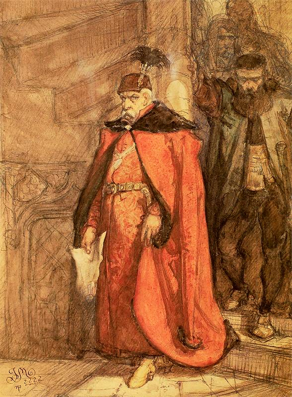 Jan Zamoyski idący obwieścić wyrok śmierci Zborowskiemu